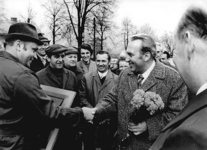 LPG Wartenberg, Auszeichnung eines Kollektivs ADN-ZB Kohls 18.4.73 Berlin: 20 Jahre LPG Wartenberg- Auszeichnung für einen vorbildlichen Brigadier. Hoachim Zeihn (l) wurde mit seinem Kollektiv der Schweinemast Lindenberg zweimal Quartalsieger im sozialistischen Wettbewerb. Konrad Naumann, Mitglied des ZK ud 1. Sekretär der Bezirksleitung der SED Berlin gratuliert herzlich. Die industriemäßige Schweinemastanlage produziert mit nur 3, 5 Arbeitskräfte-Stunde 100 Kilogramm Schweinefleisch. Das ist DDR-Spitze. (siehe ADN-Meldung)